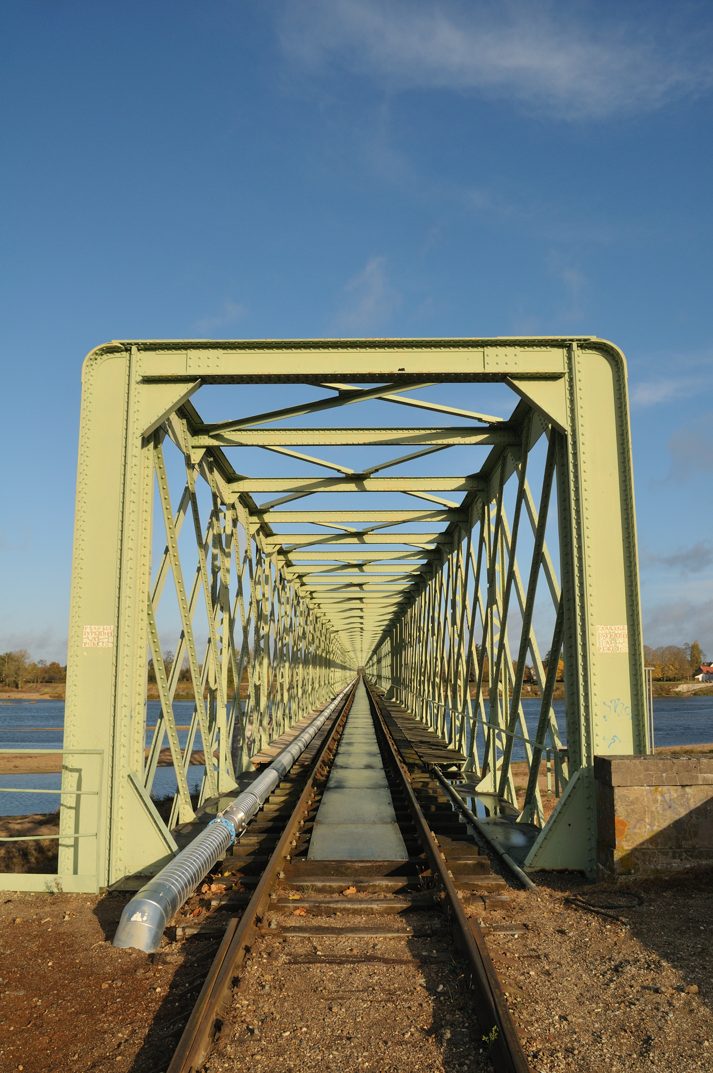 Viaduc ferroviaire de la ligne marchandises d'Orléans à Argent-sur-Sauldre, Sully-sur-Loire, France